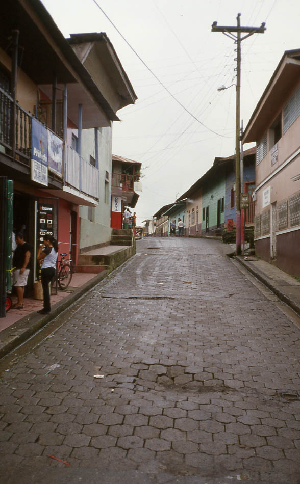 Calle de San Carlos, Río San Juan, Nicaragua. 2002